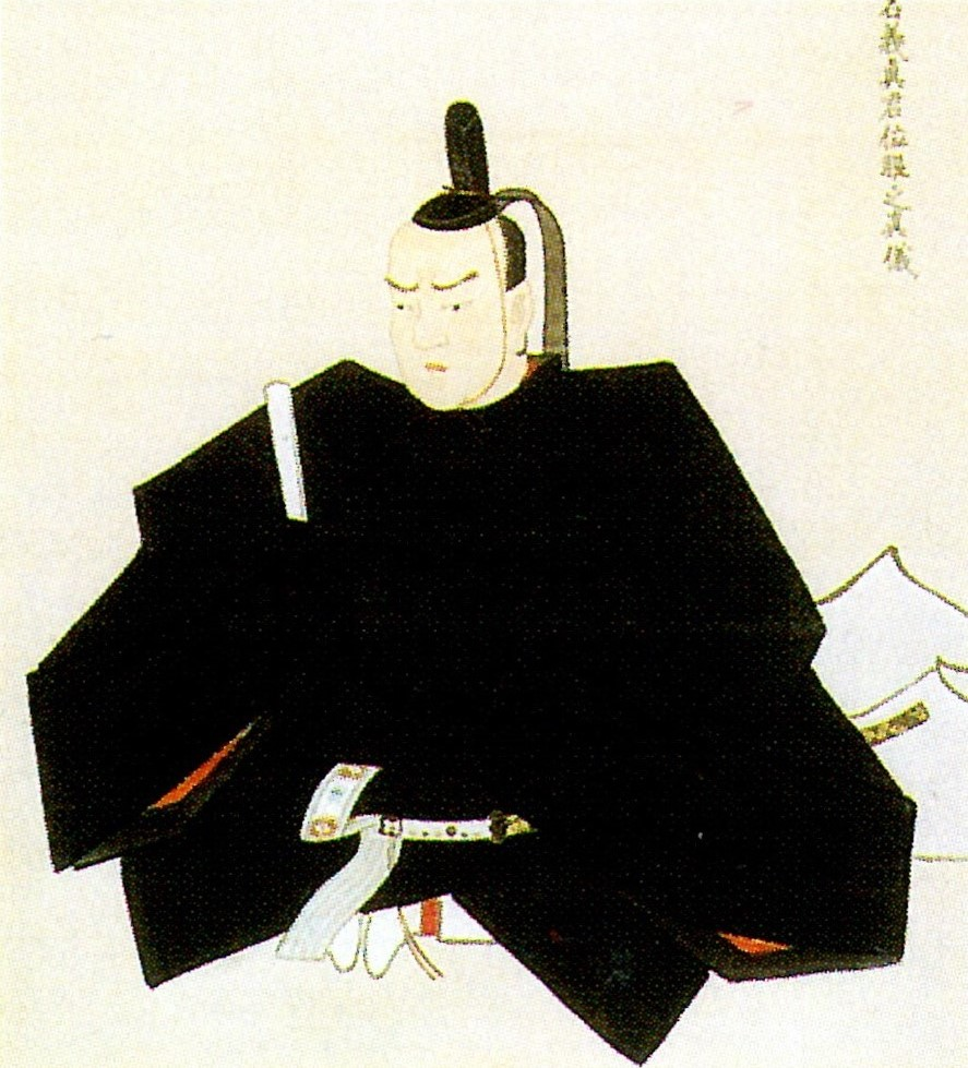 佐竹義真の肖像。